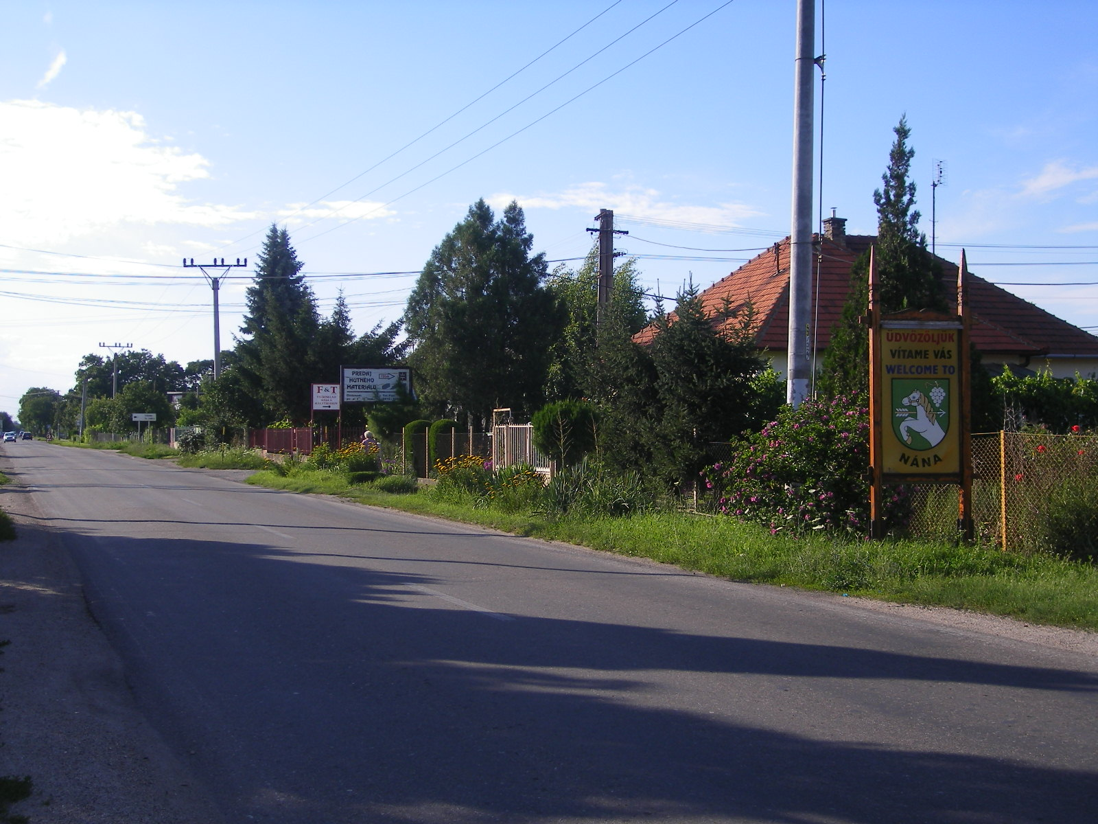 Nána - a 76-os főút a falu déli szélén